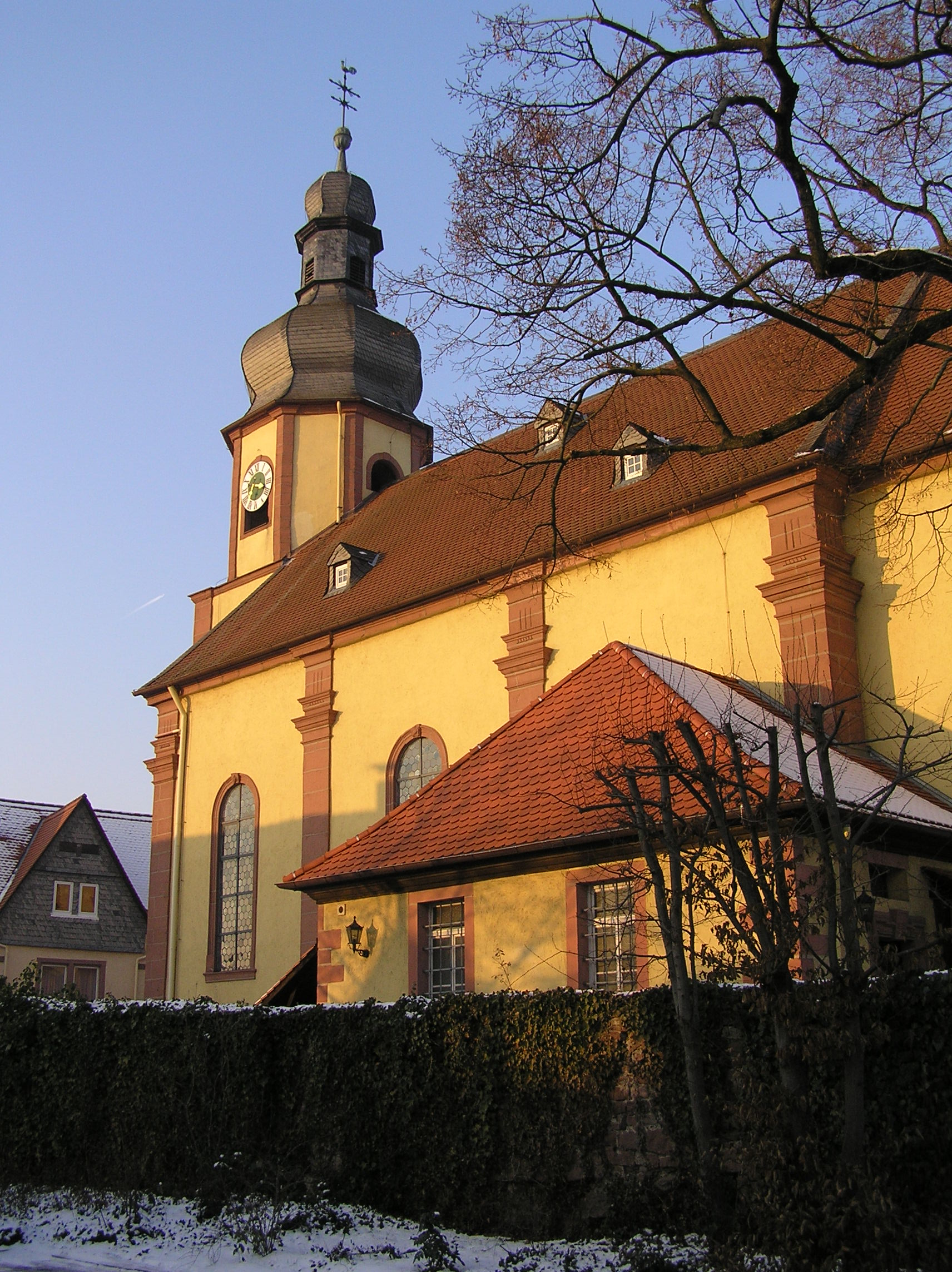 Die alte Pfarrkirche in Elsenfeld im Winter